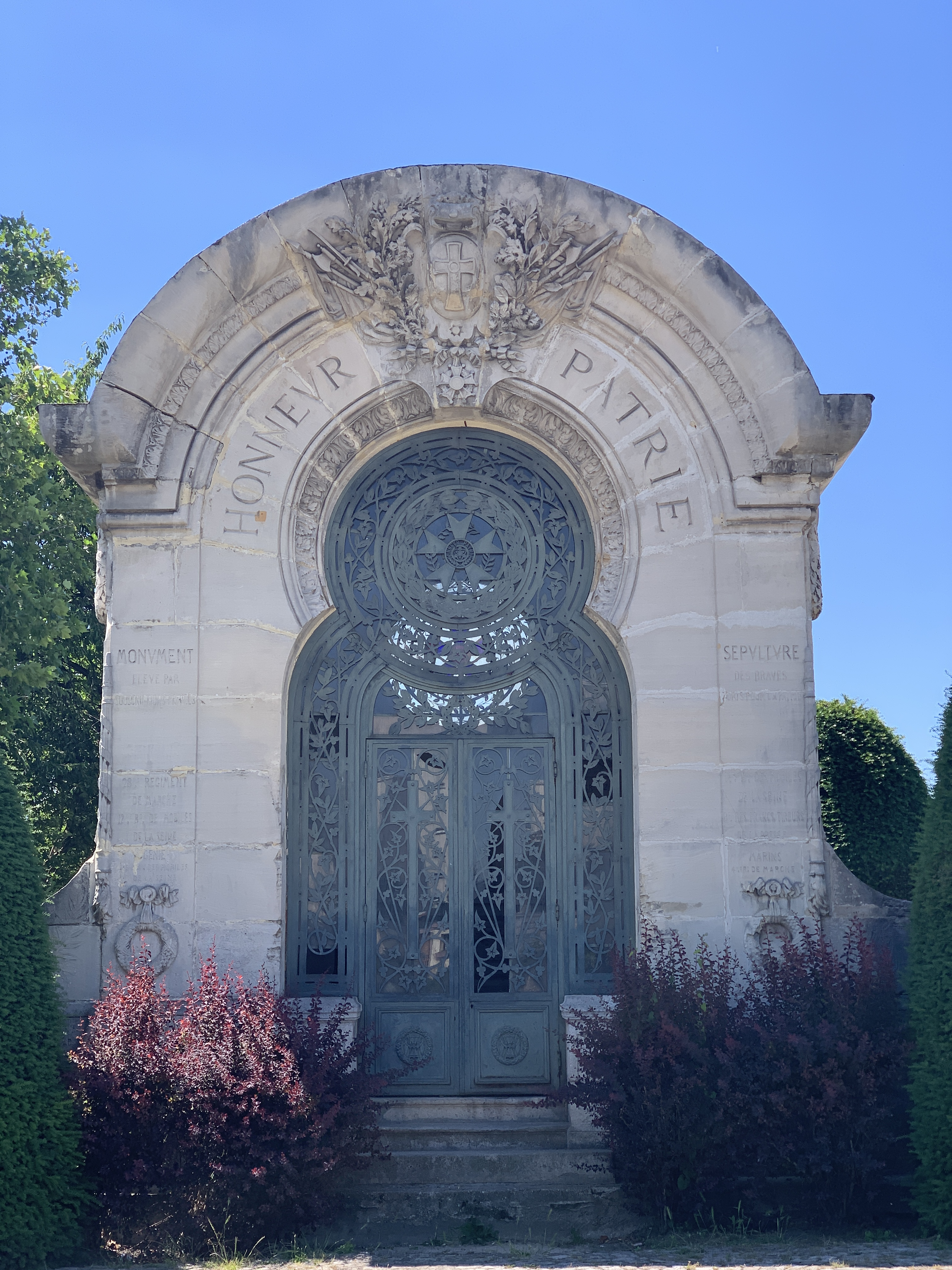 Monument aux Défenseurs du Bourget, Le Bourget.